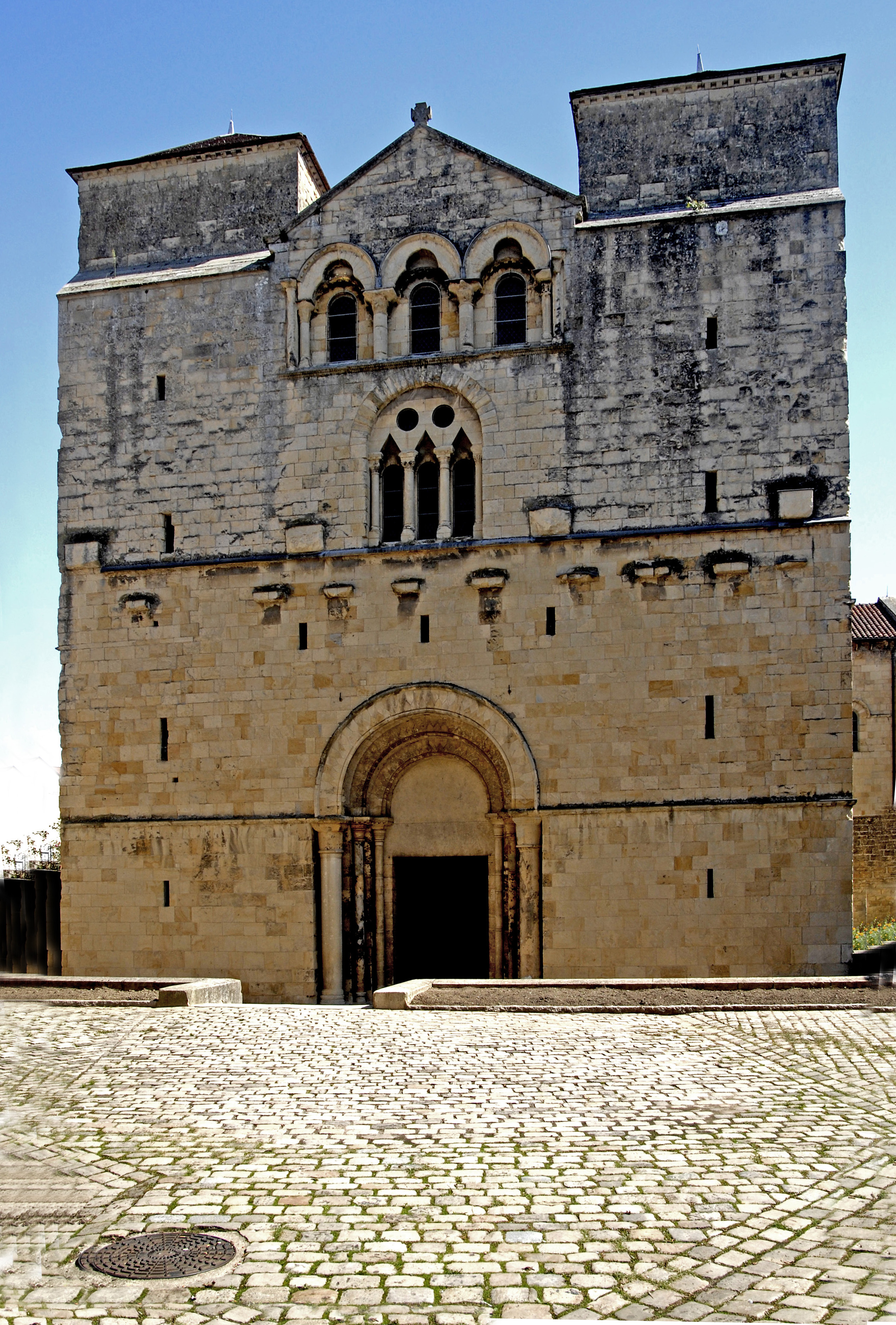 St.-Etienne Nevers, Fassade